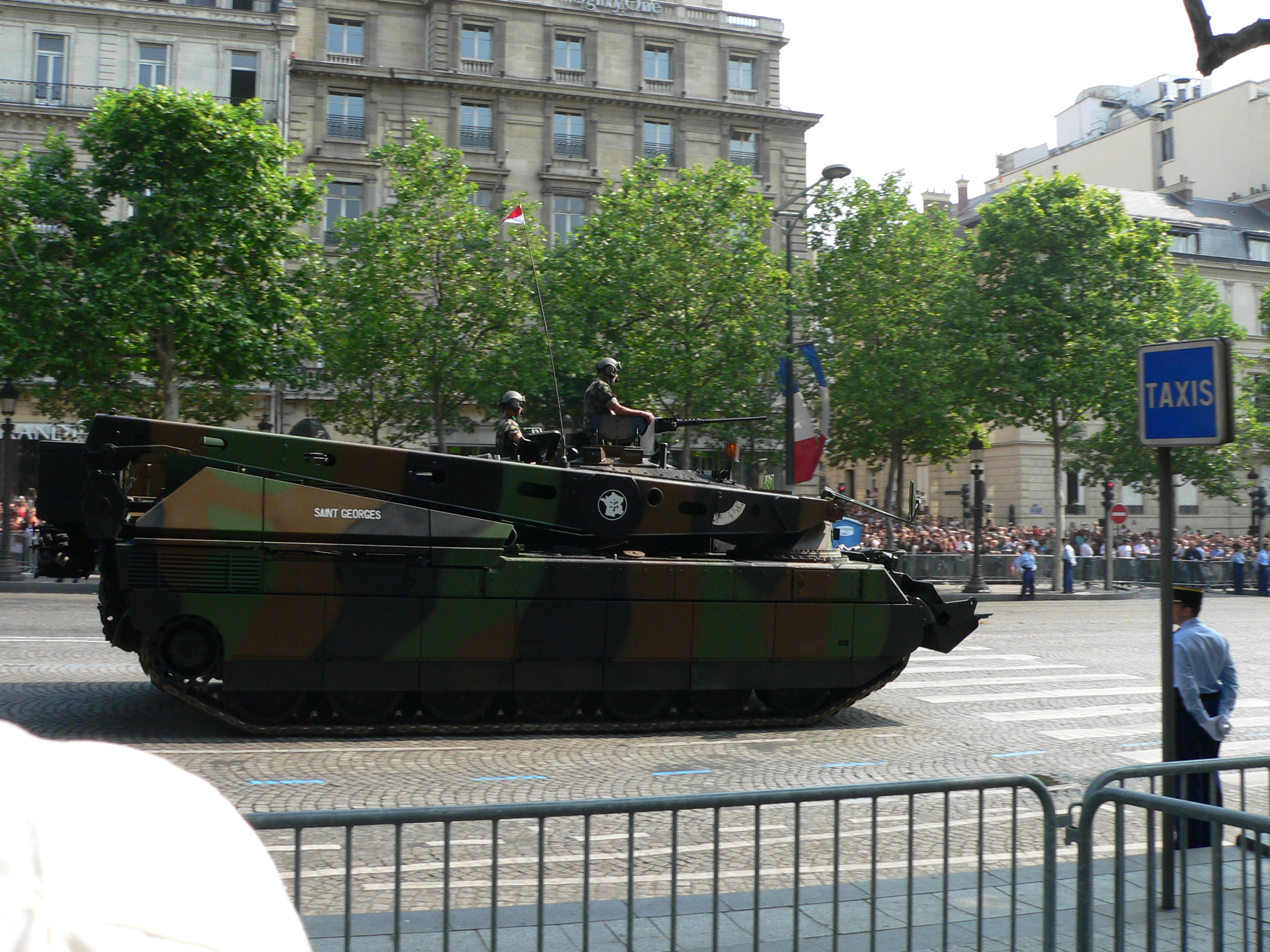 Char de dépannage DNG/DCL. Military parade, Avenue des Champs-Élysées (Paris), 14 July 2006